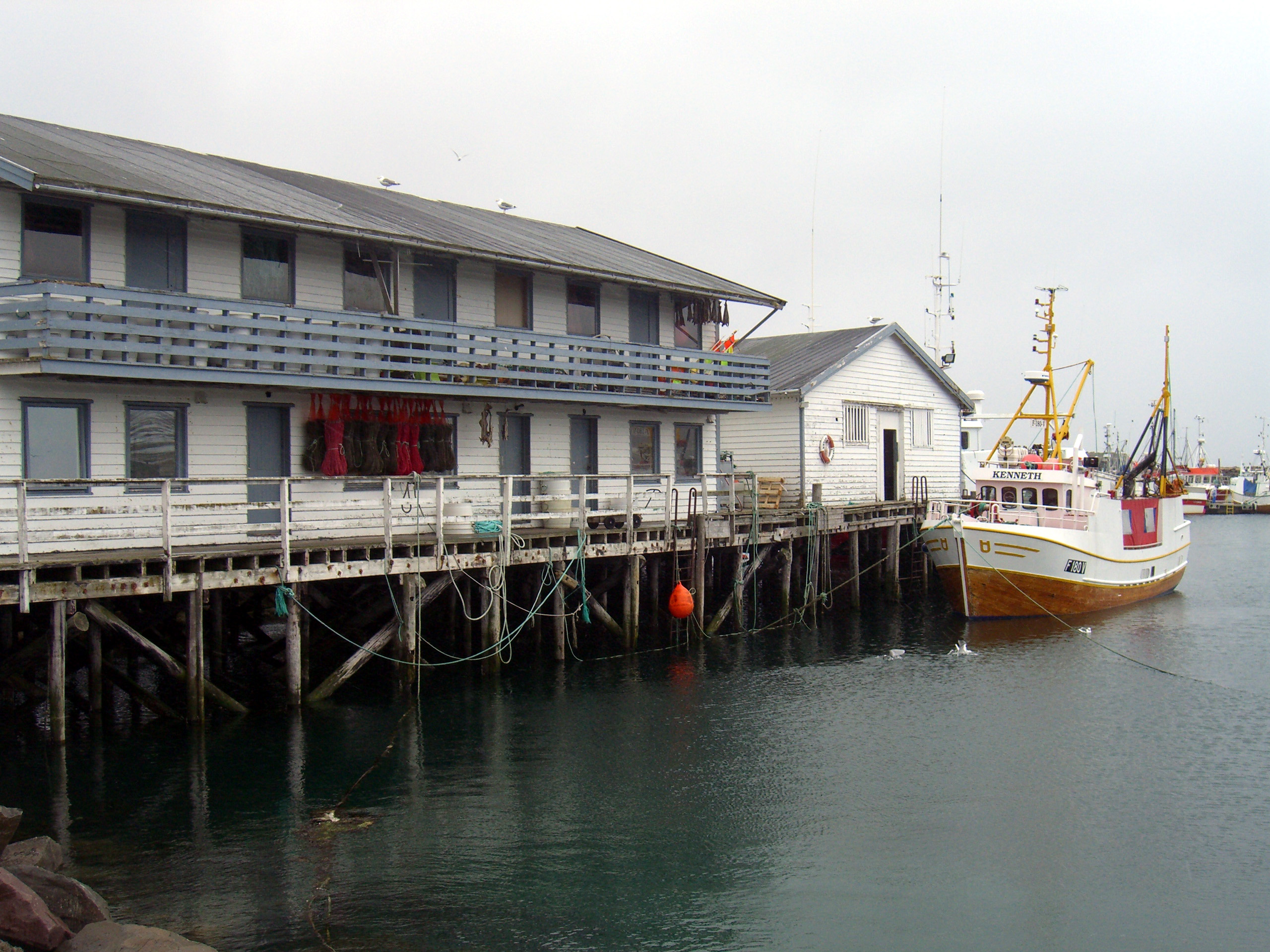 Kiberg harbour